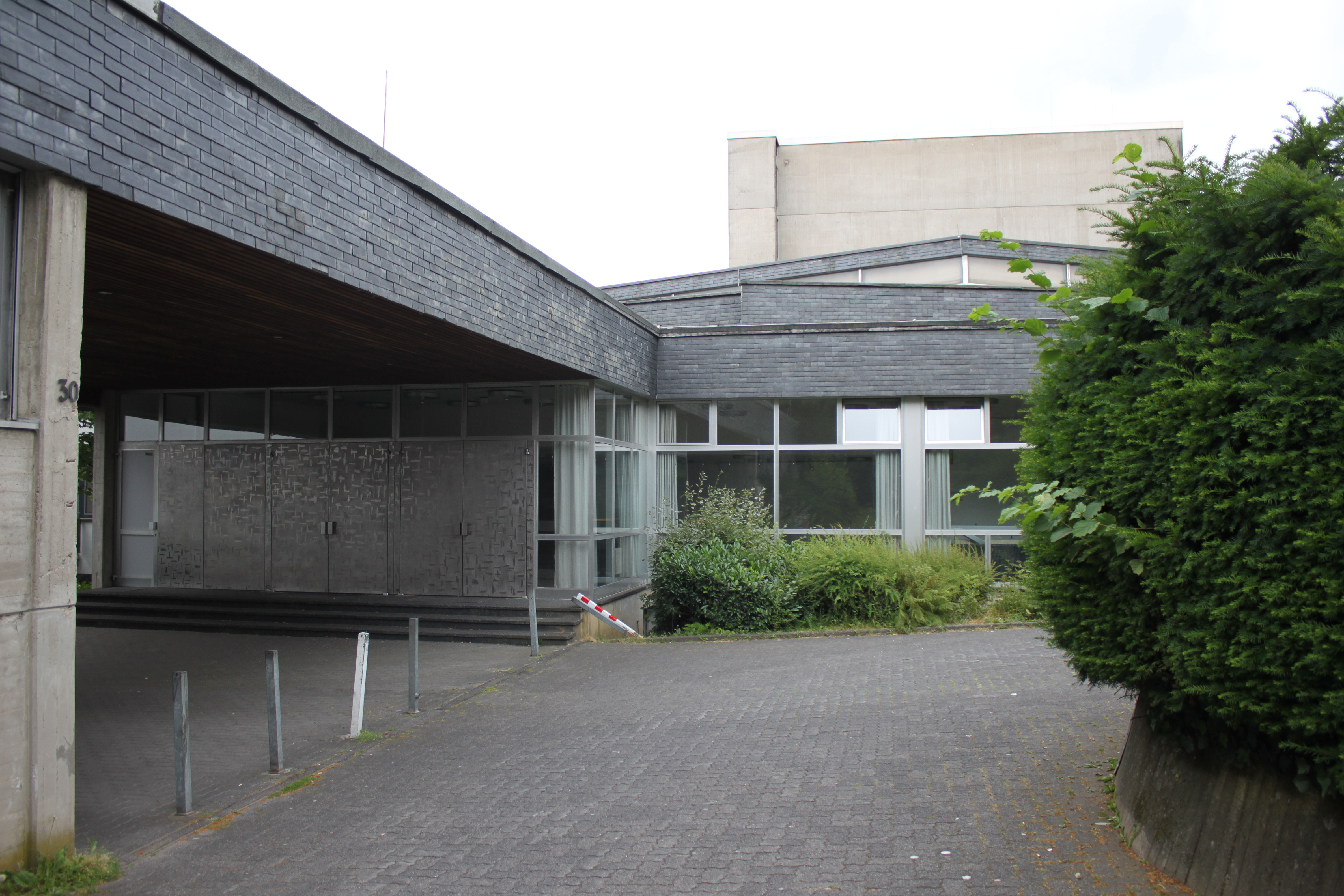 Bühnenhaus Gummersbach Haupteingang Nordseite, Reininghauser Straße